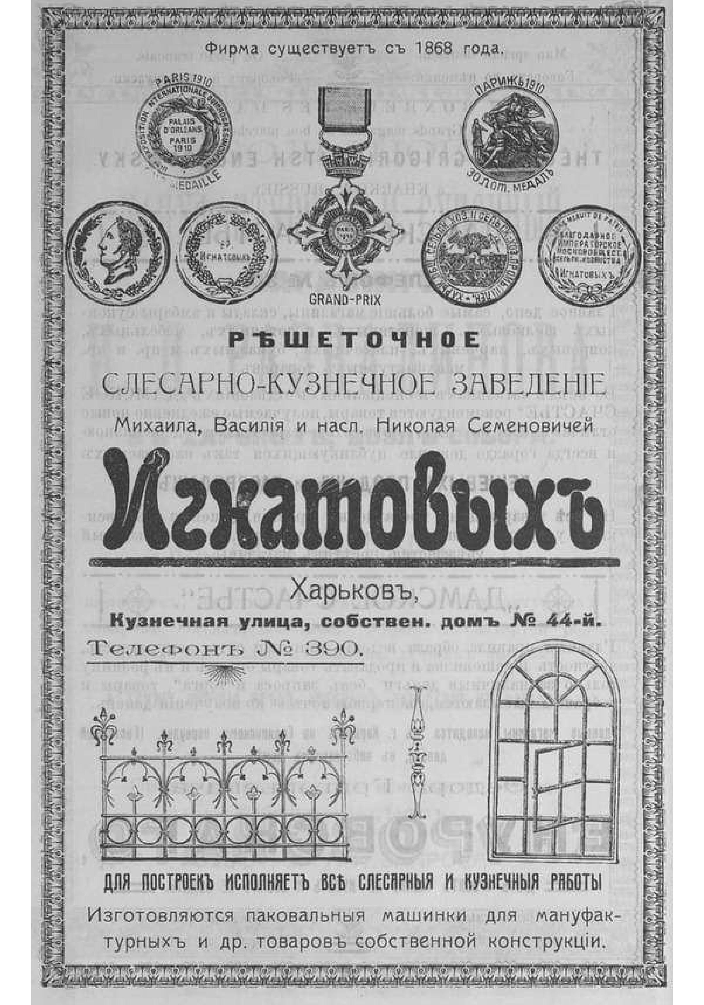 Російська імперія. Харків. 1914 рік. Реклама ковальського підприємства Ігнатових, розташованого на Ковальській вулиці, 44